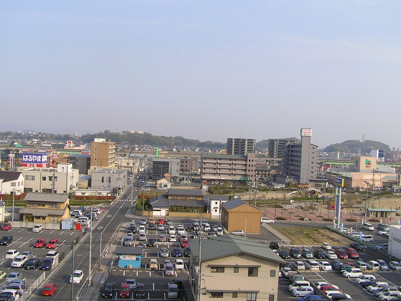 shinkurashiki town 1